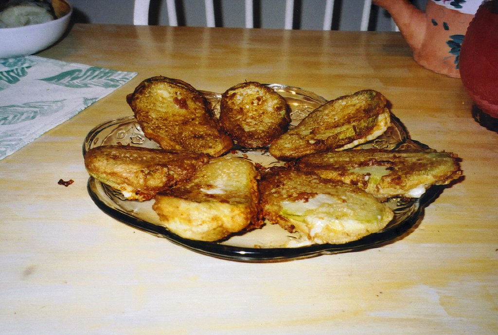 Gusiquil relleno con con queso, comida que nos gusta mucho a los salvadoreÑOs